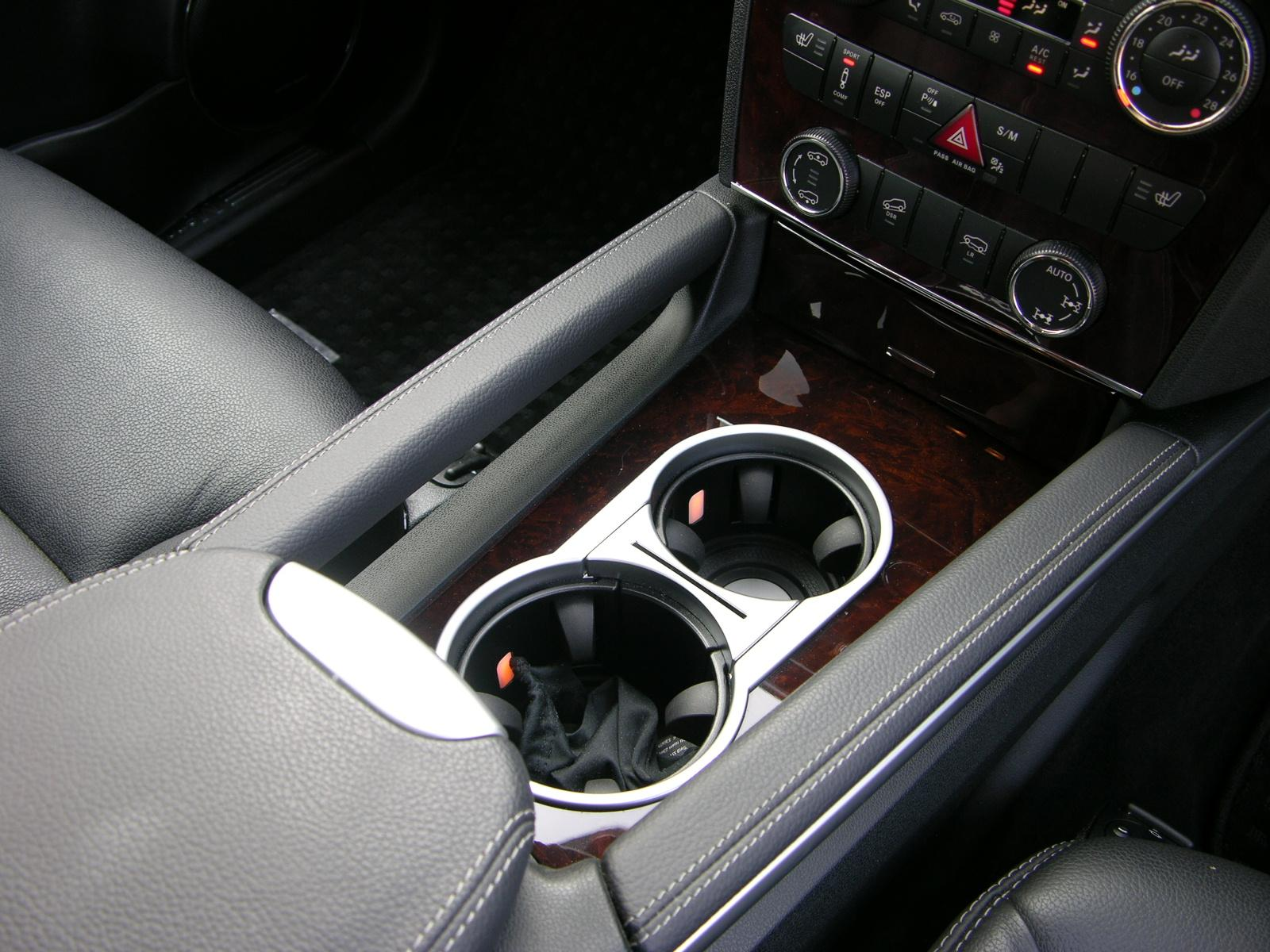 Mercedes Benz GL420 CDi 4-Matic